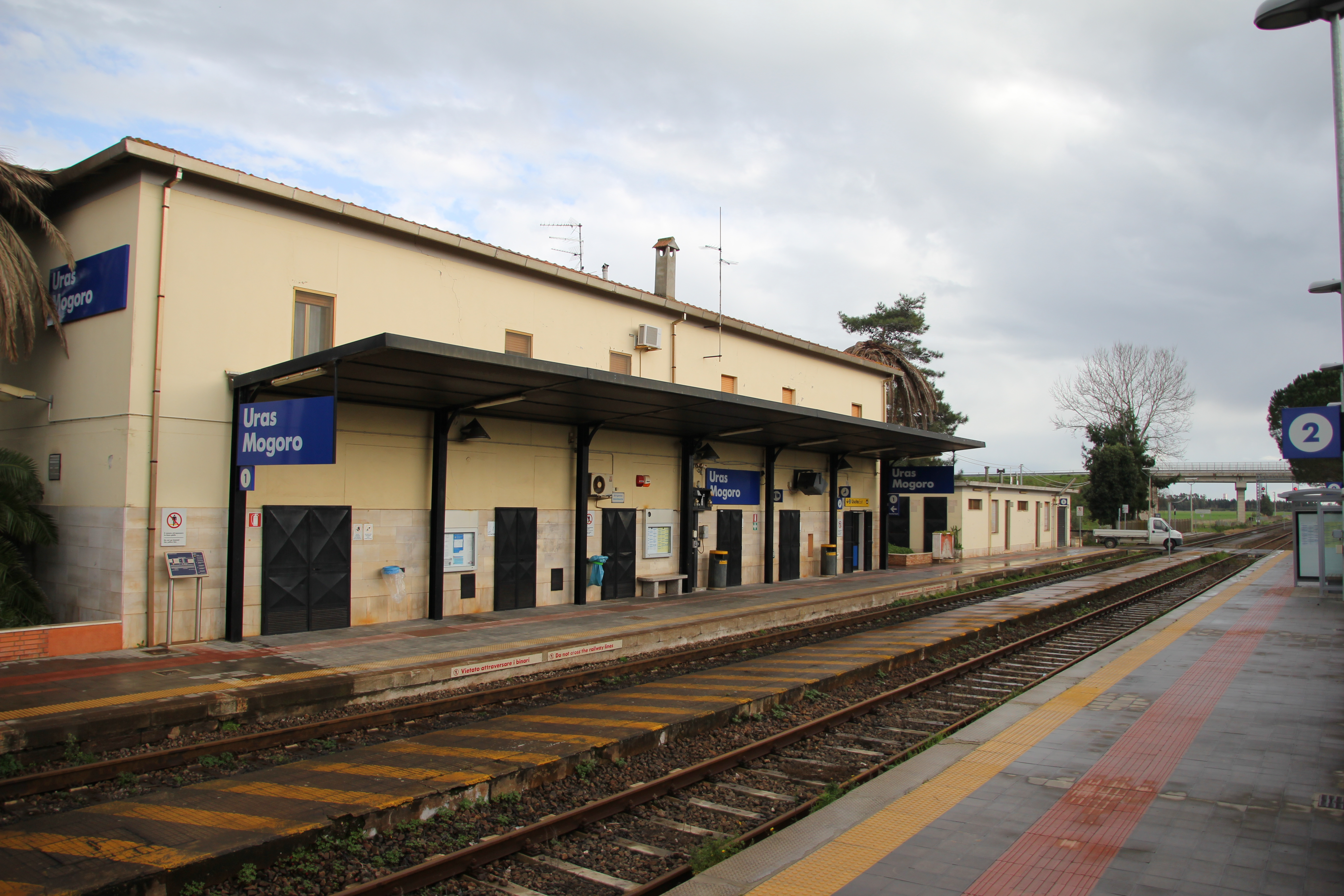 Uras - Stazione ferroviaria di Uras-Mogoro